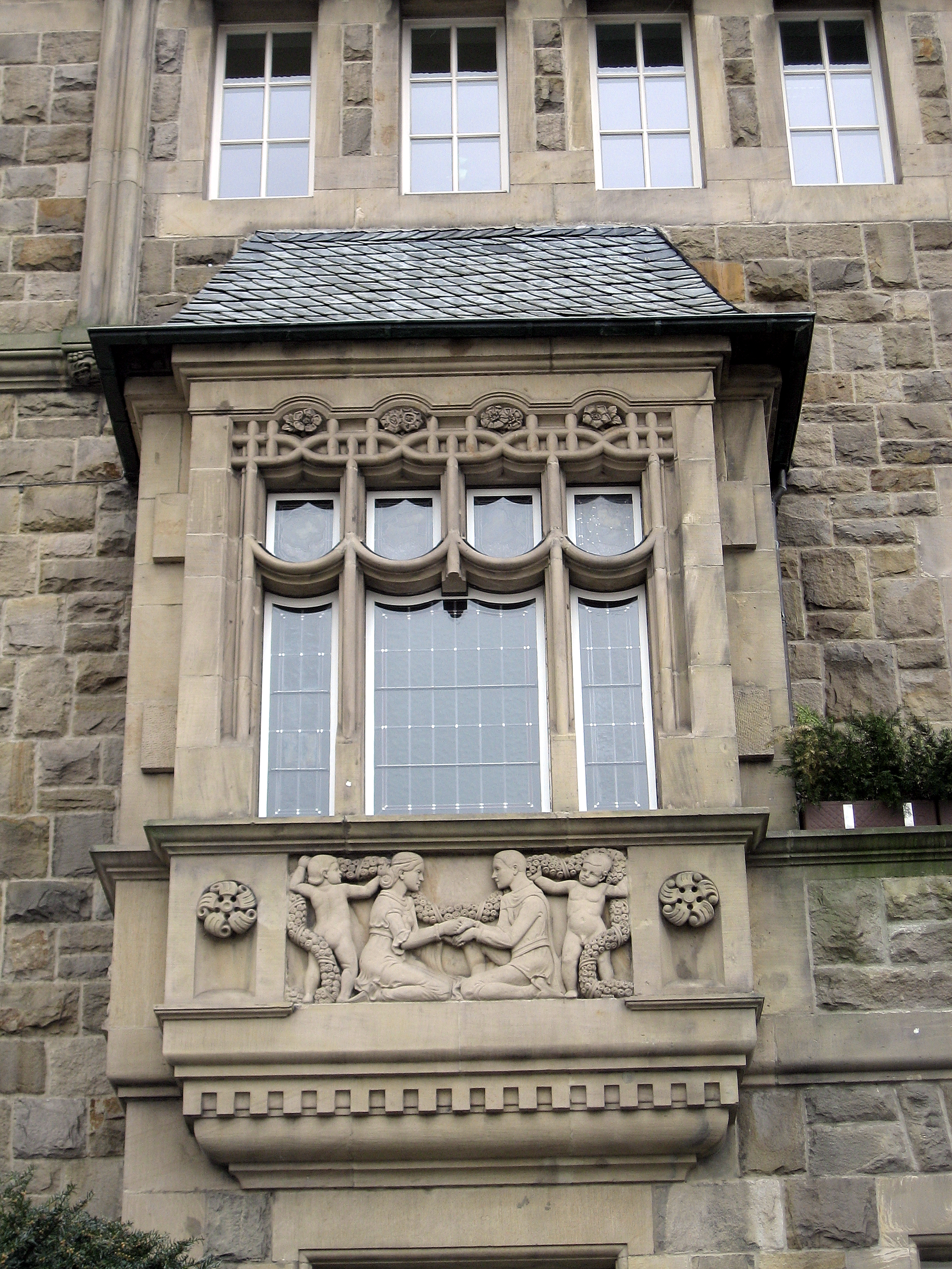 Rathaus in Wetter (Ruhr); Fassaden-Detail (Erker), im Brüstungsfeld das Hochzeitsrelief von Bildhauer Friedrich Bagdons